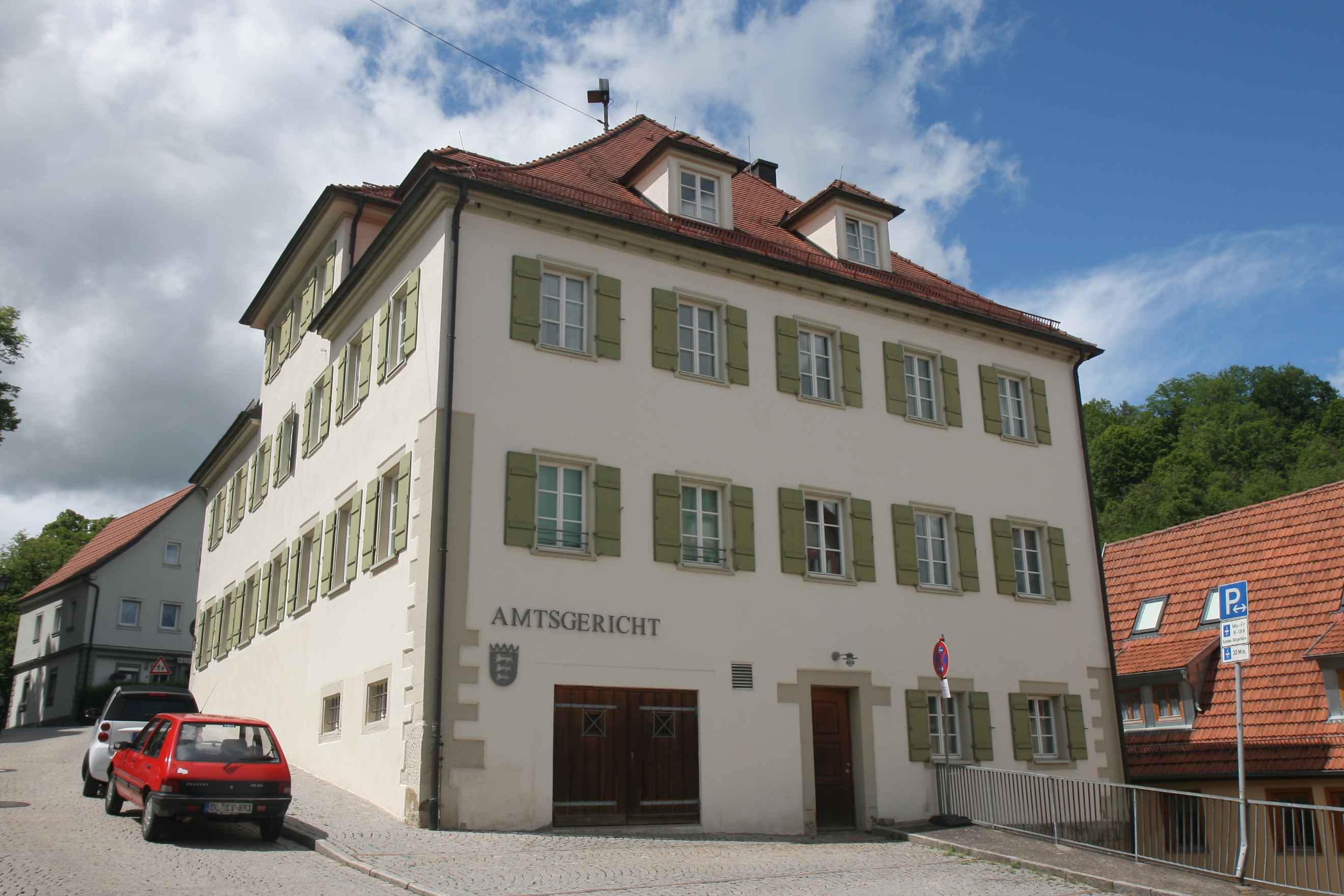 Amtsgericht Horb am Neckar, Marktplatz 22 in Horb am Neckar.